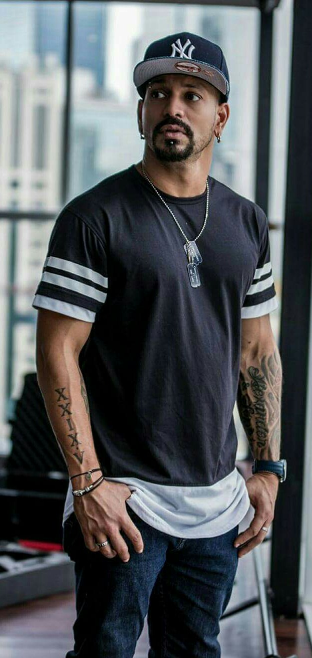 Tinomatik en la ciudad de Panamá